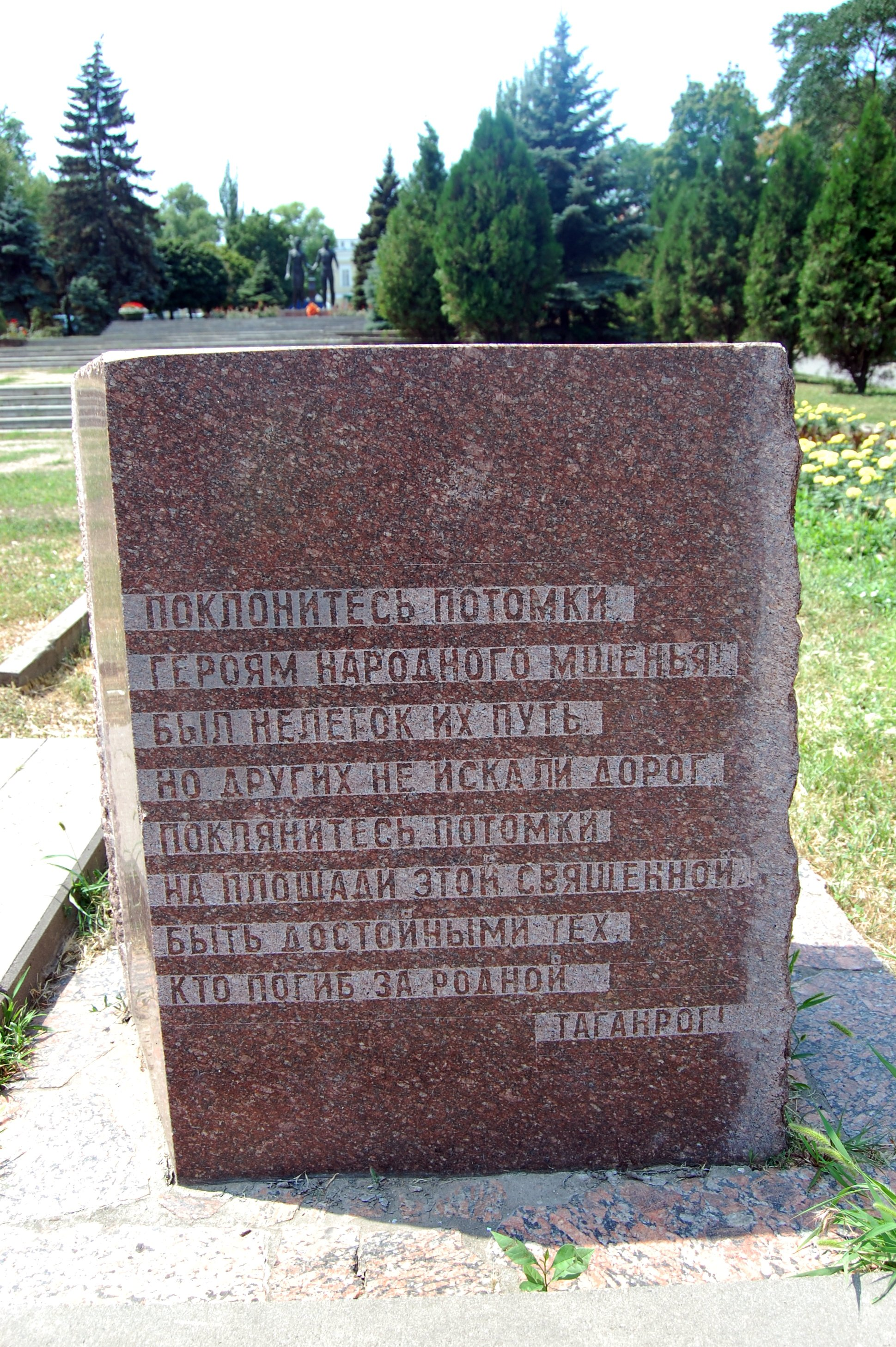 Камень у подножия мемориала таганрогским подпольщикам «Клятва юности»